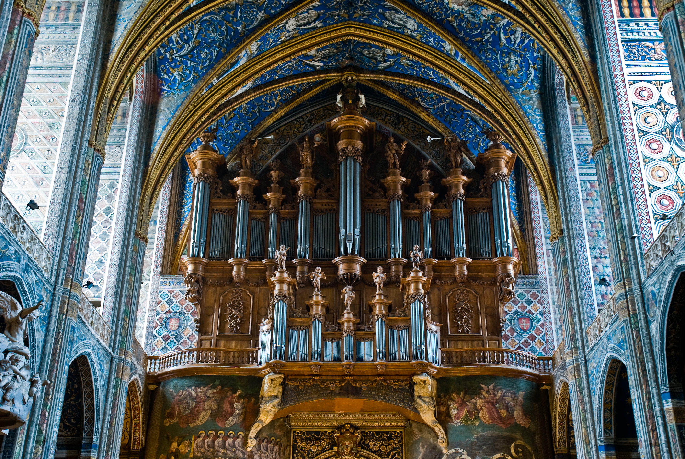 Buffet d'orgues (Cathédrale Sainte-Cécile, Albi)